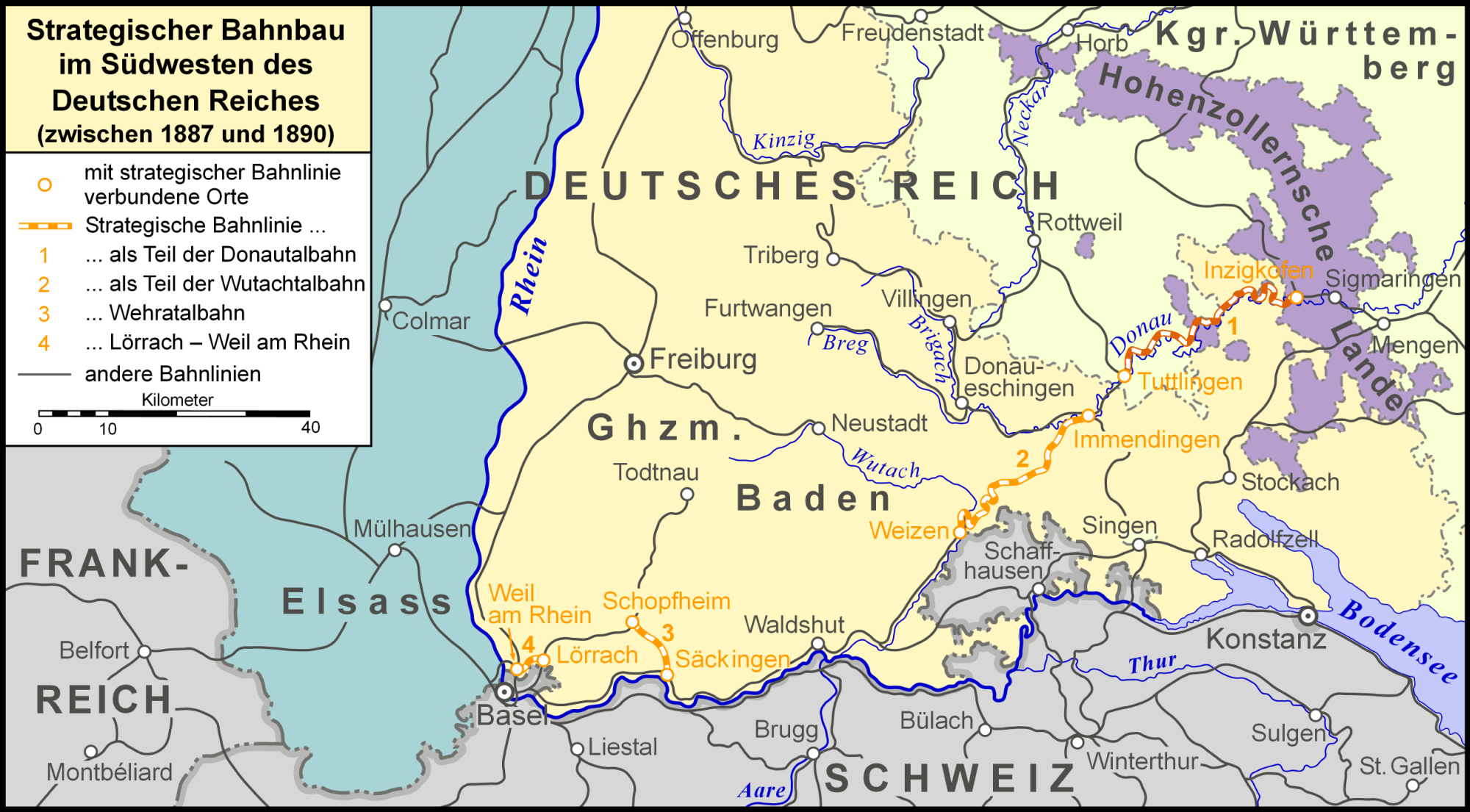 Strategischer Bahnbau in Südbaden